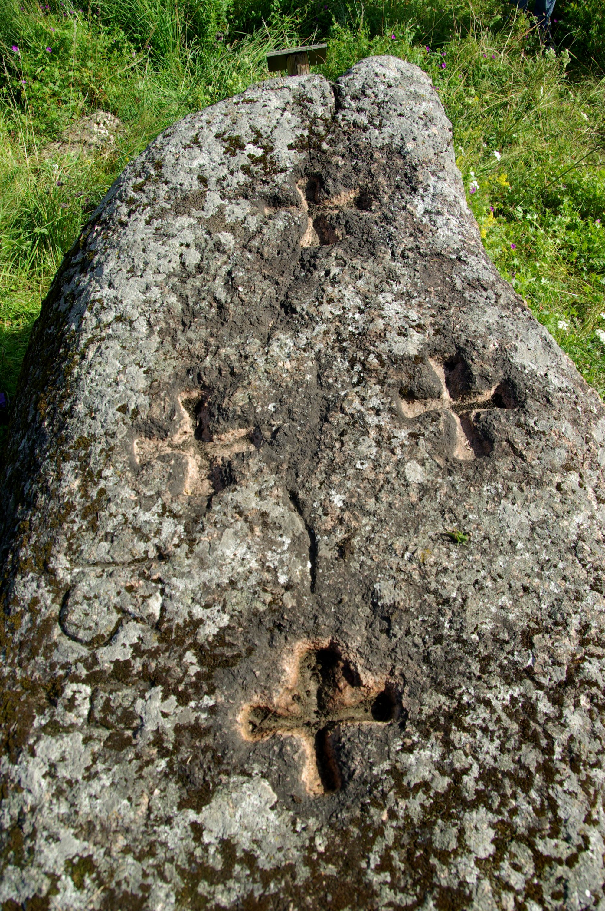 Harju maakond, Kuusalu vald, Kuusalu küla